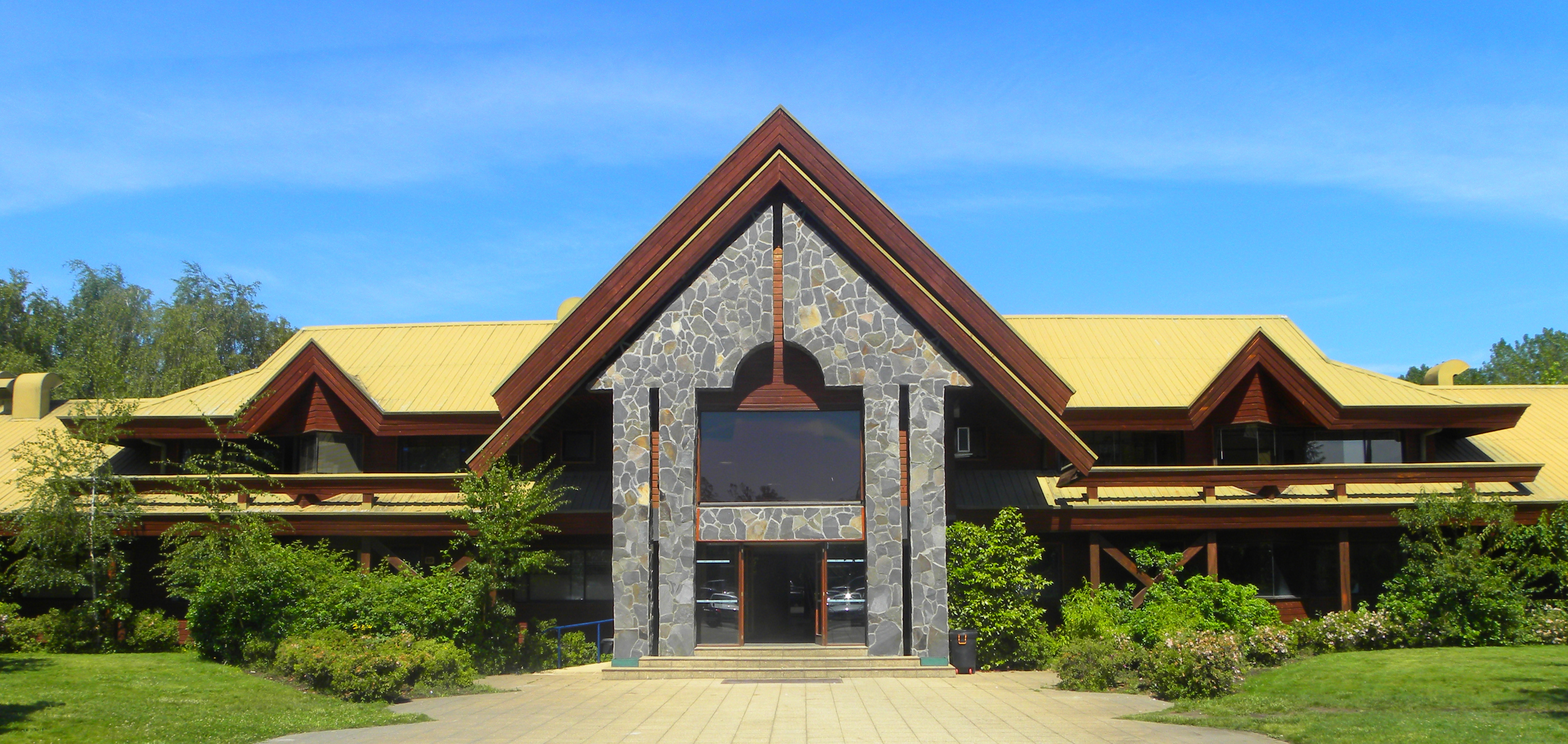 Frontis Universidad Pedro de Valdivia, Sede Chillán.